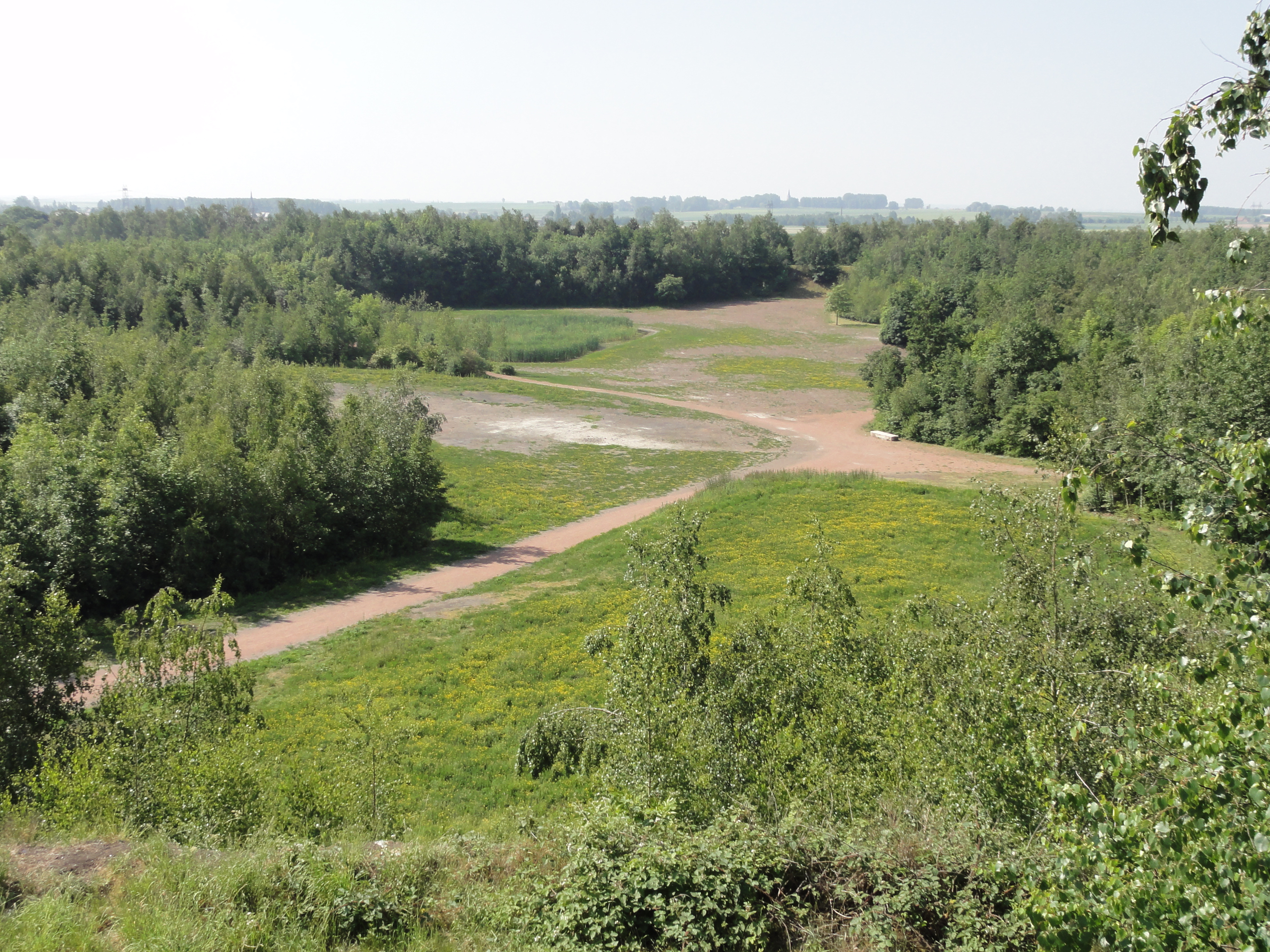 Terril n° 227 dit 3 d'Azincourt, Fosse n° 3 de la Compagnie des mines d'Azincourt, Monchecourt, Nord, Nord-Pas-de-Calais, France.